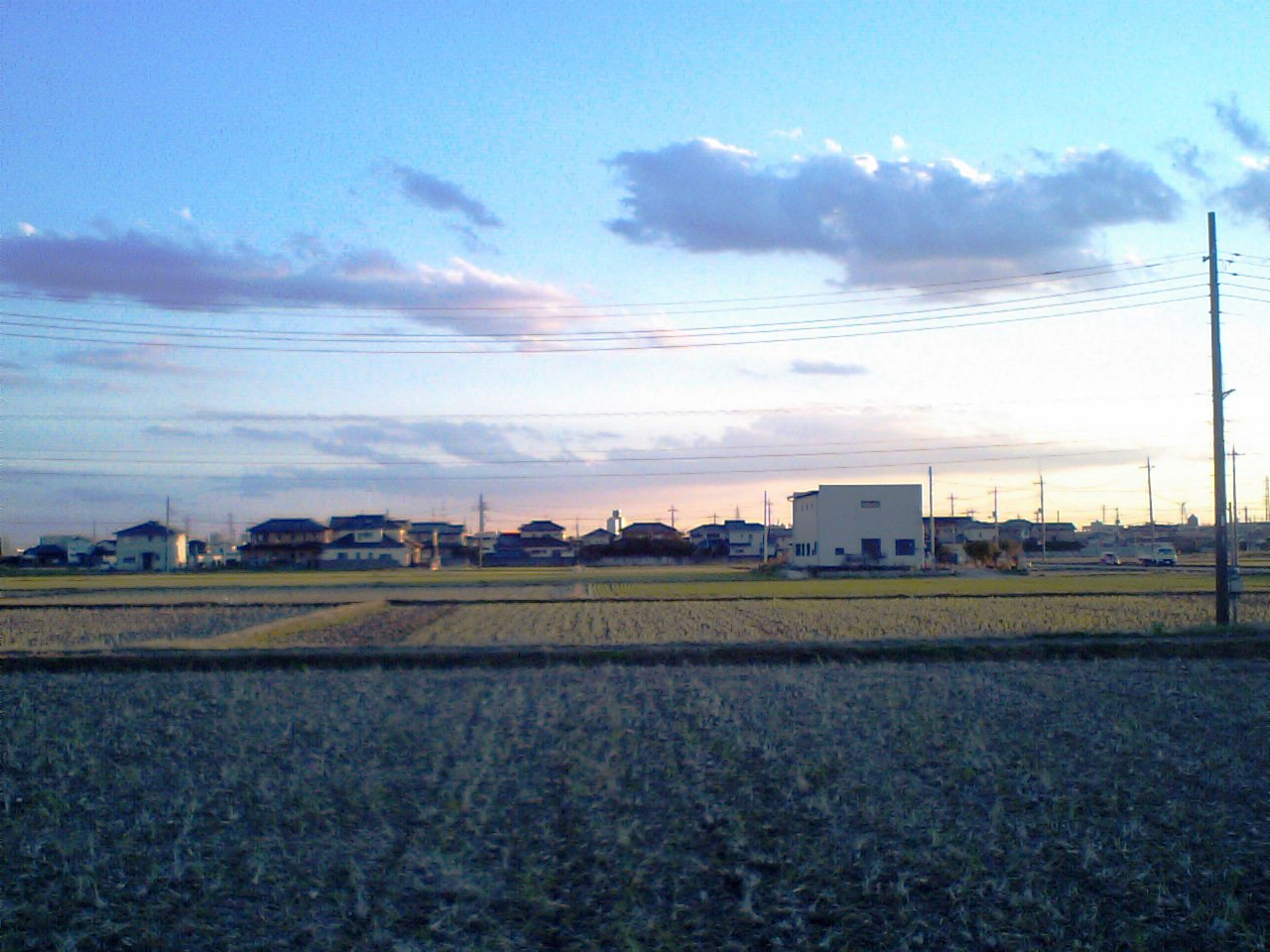 埼玉県川越市大字川越・芳野農協前バス停付近より南側を撮影。